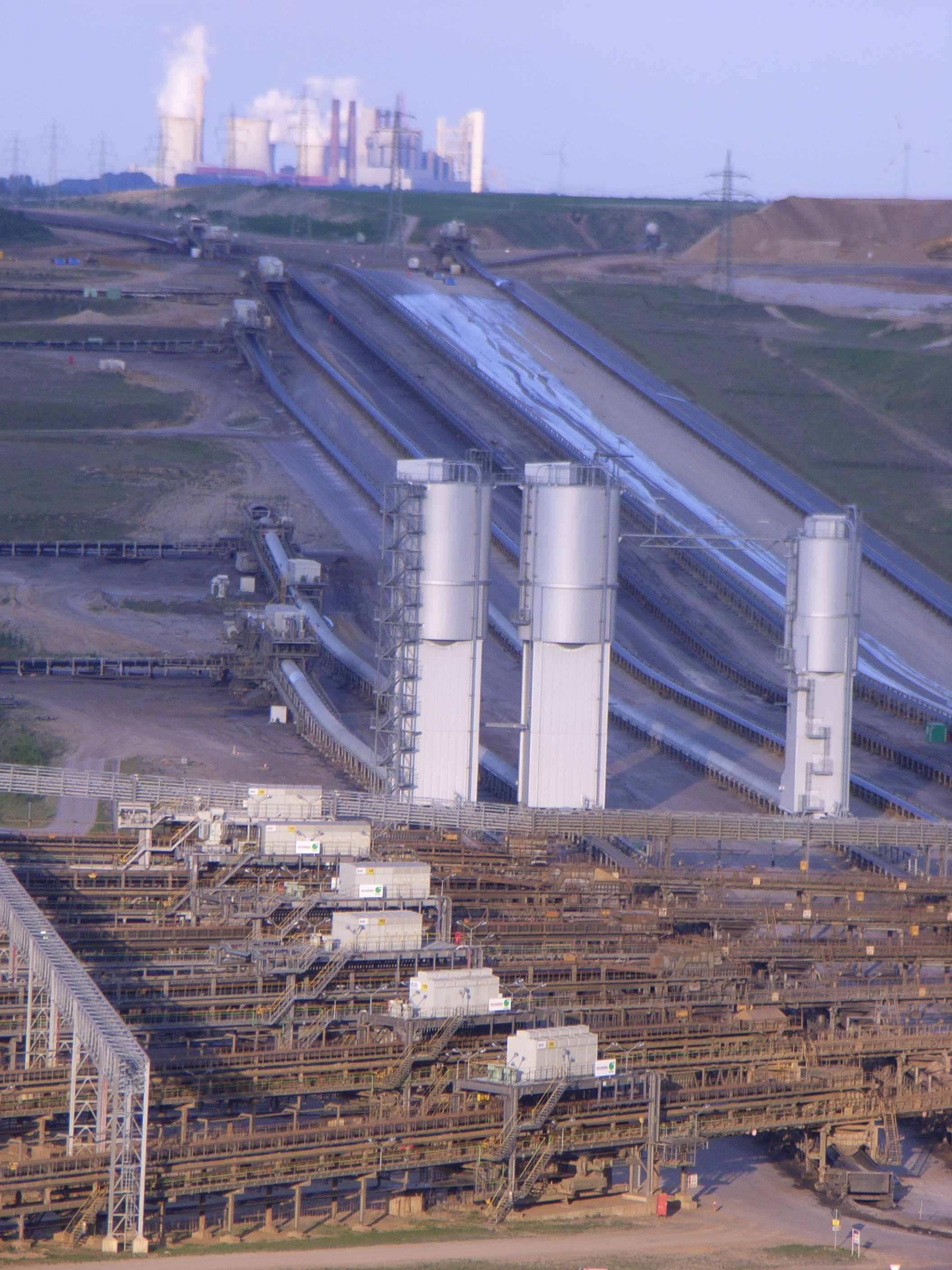 Bandverteileranlage im Tagebau Garzweiler und Karftwerk Neurath